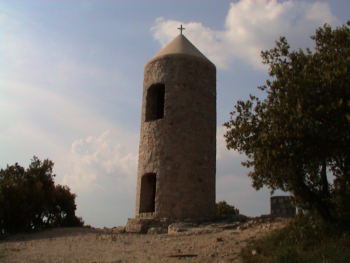 Photographie de la tour dominant la vallée de l'arc, tour de l'ermitage de Saint-Jean-du-Puy à Trets dans les Bouches-du-Rhône (France).